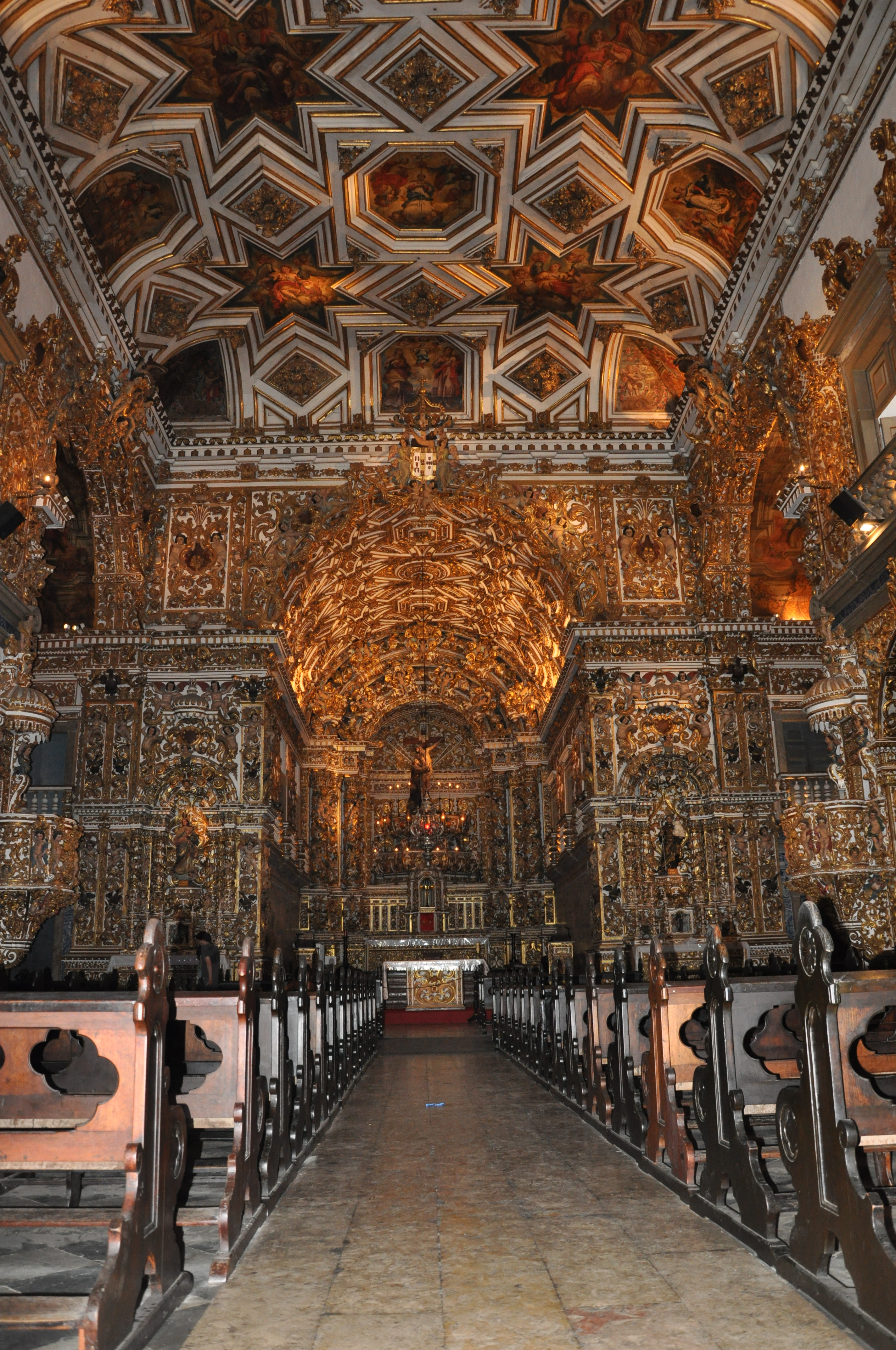 Interior of Igreja de São Francisco, Salvador